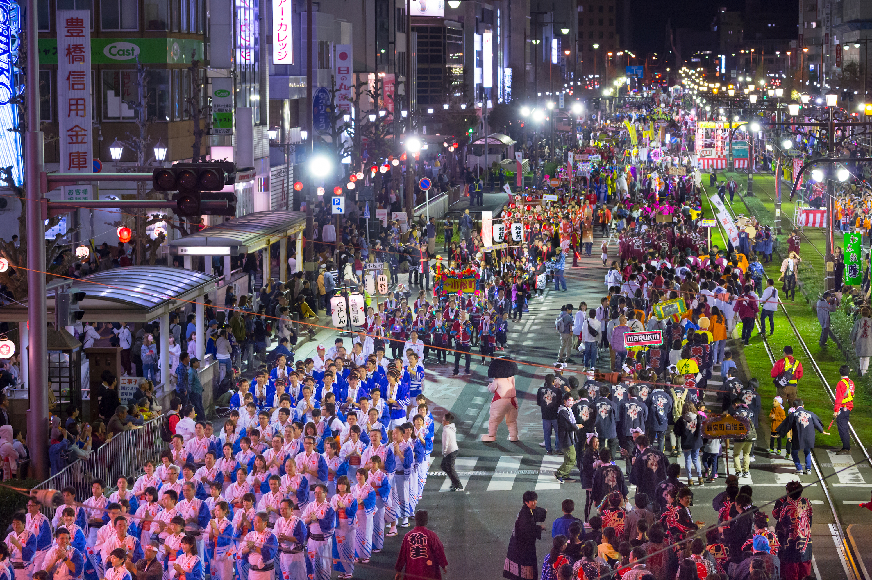 豊橋まつり2018での総踊りの様子